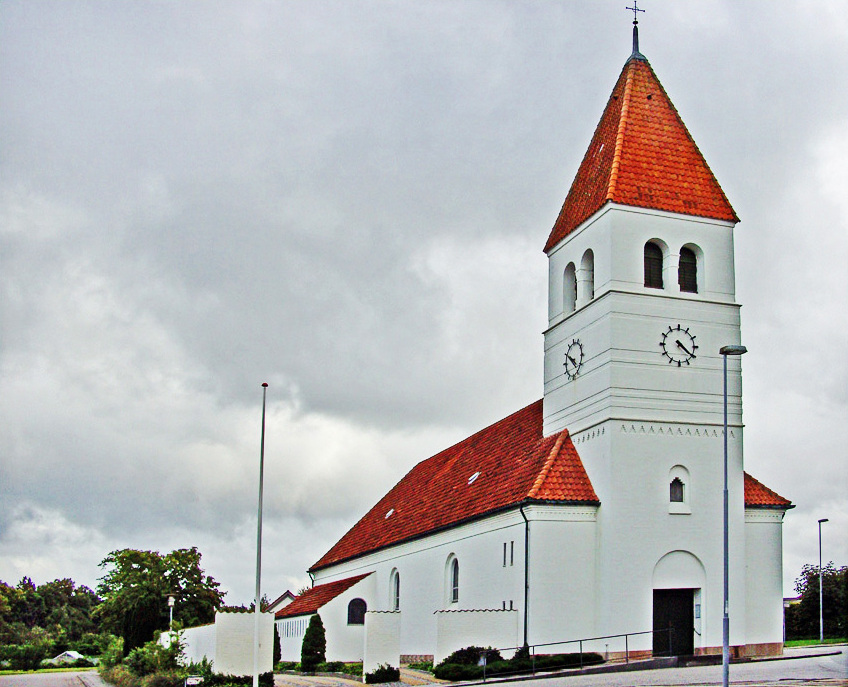 fra nordvest